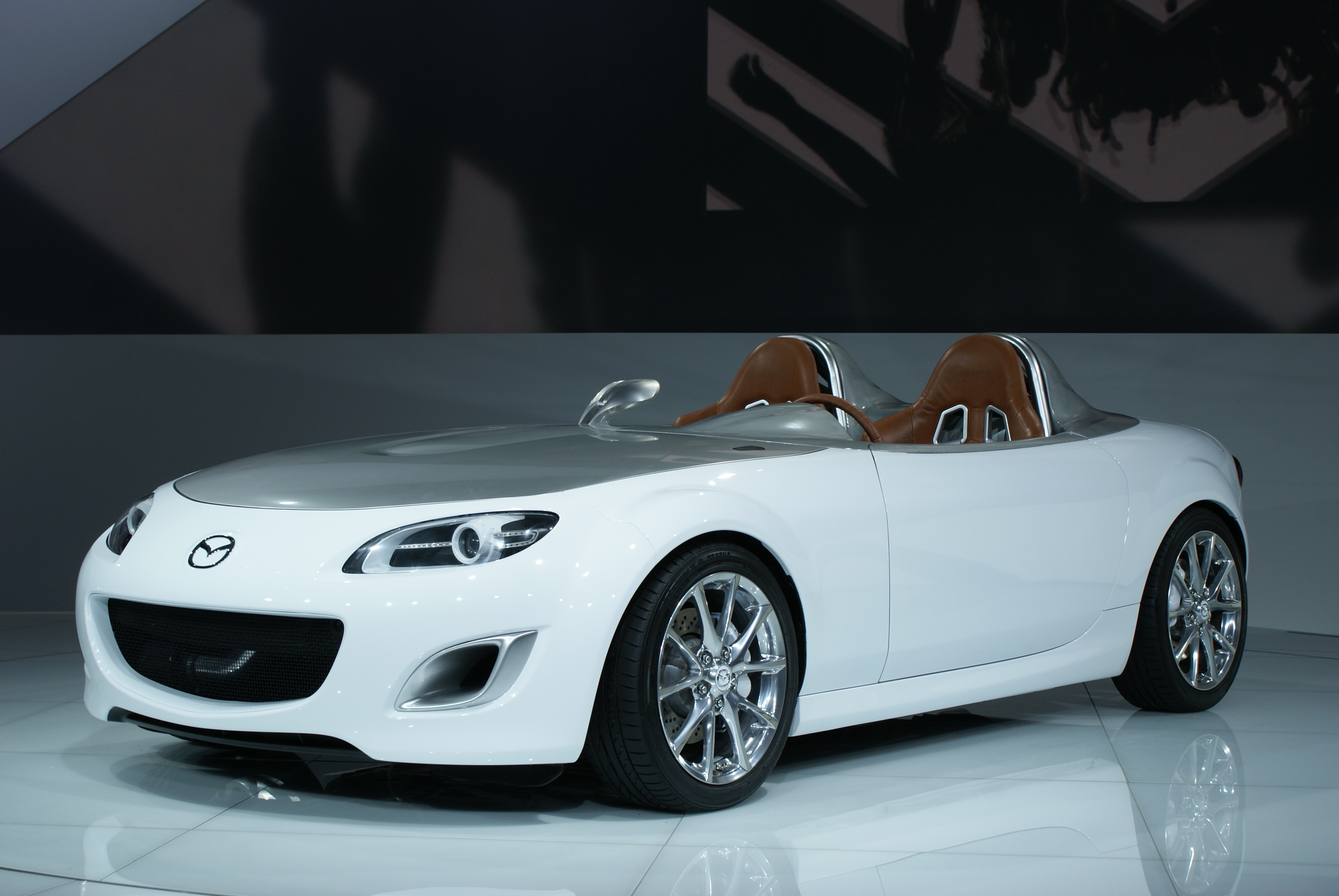 IAA 2009